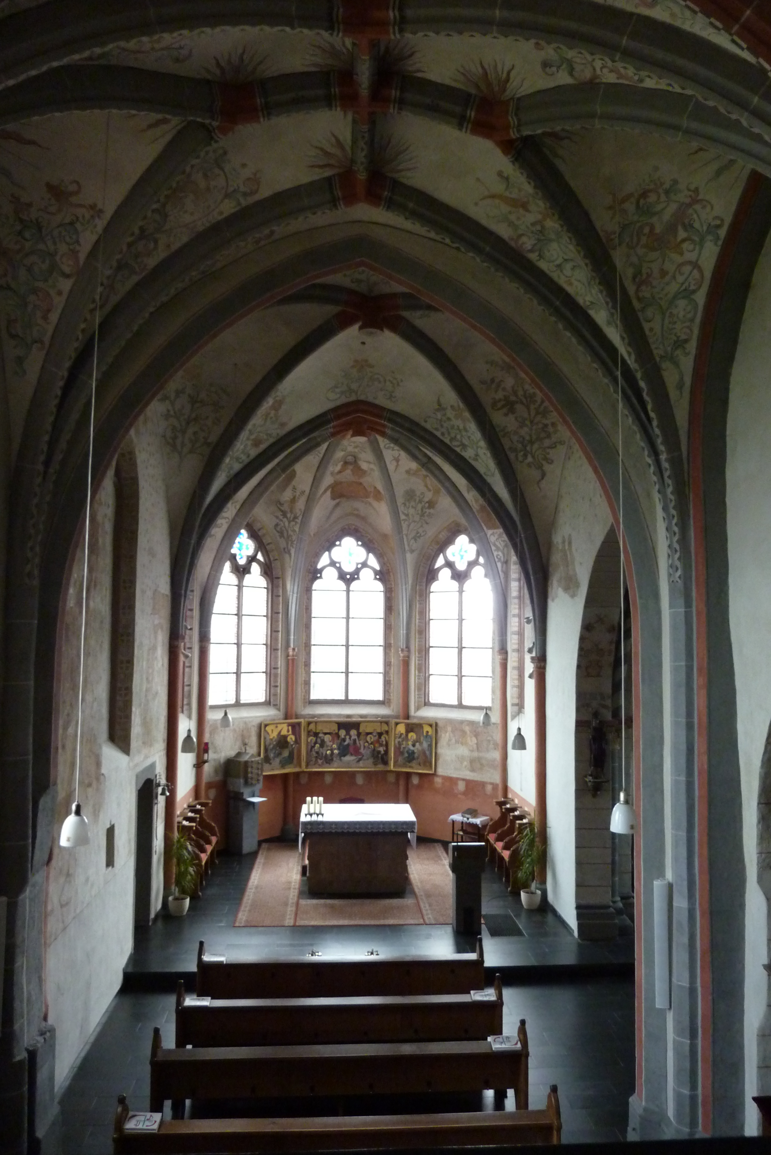 Innenansicht der katholischen Pfarrkirche St. Georg in Frauenberg